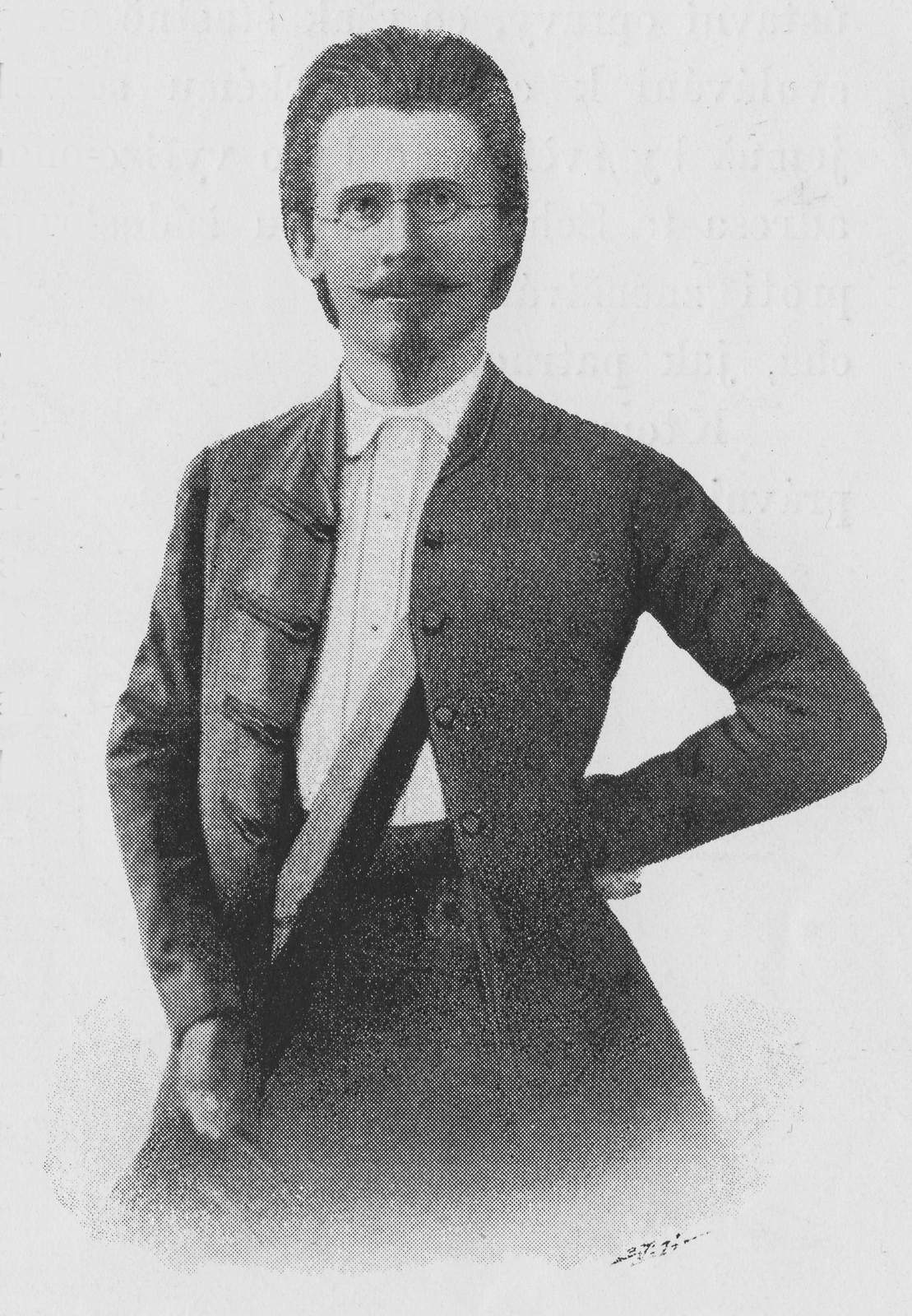 Vojtěch Náprstek (1820-1894) um 1848